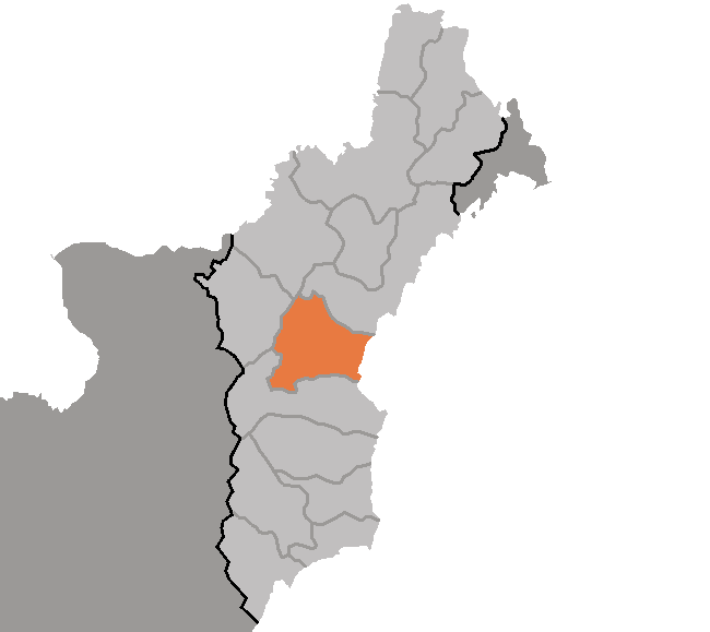 Map of Kyongsong, Hamgyong-pukto, DPRK, 2006